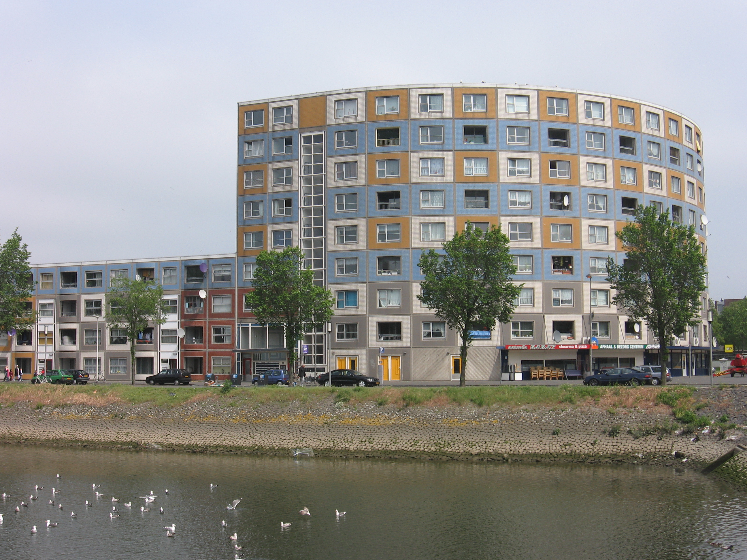 Peperklip